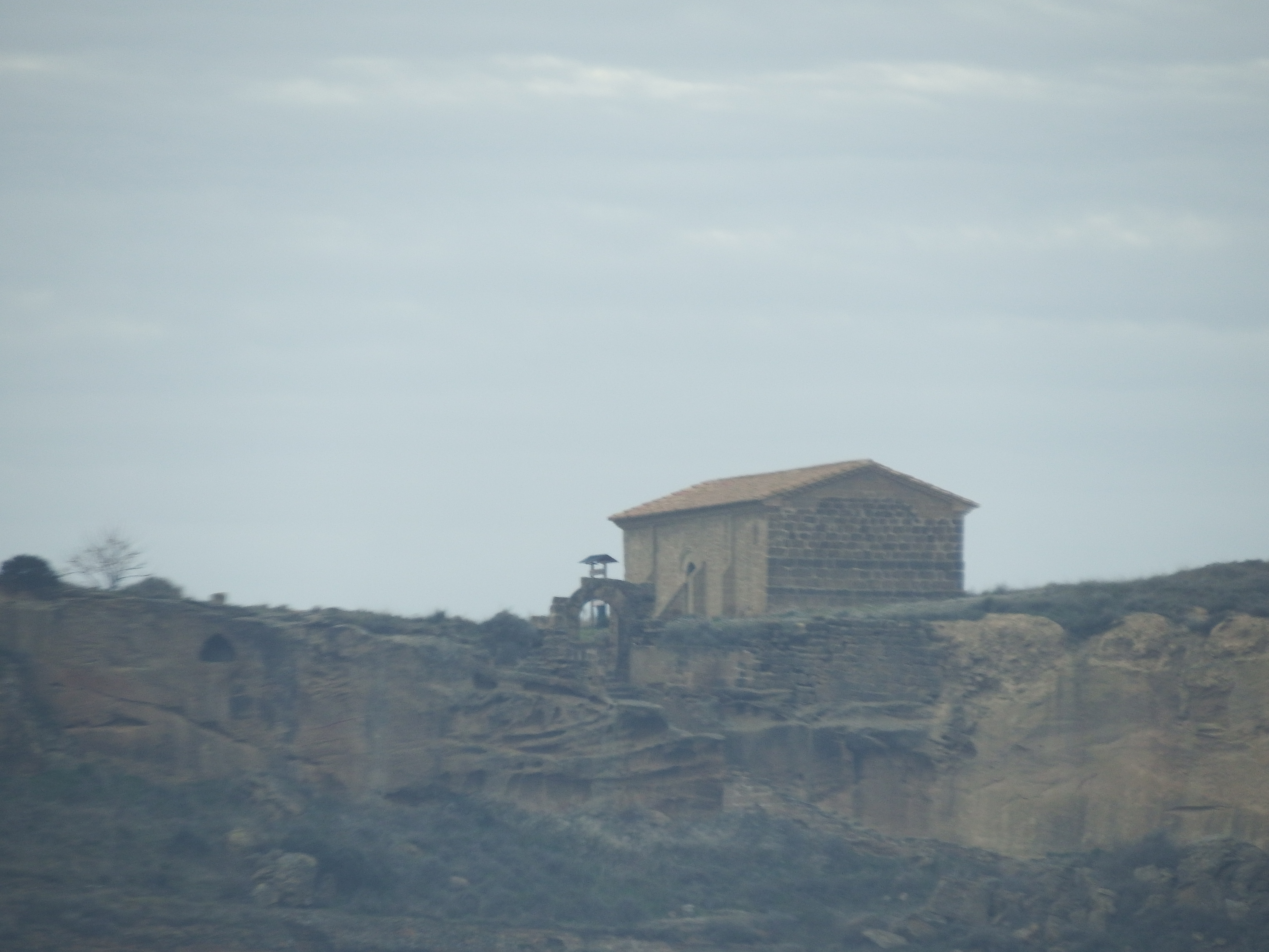 Ermita y castillo de Alberuela de Tubo